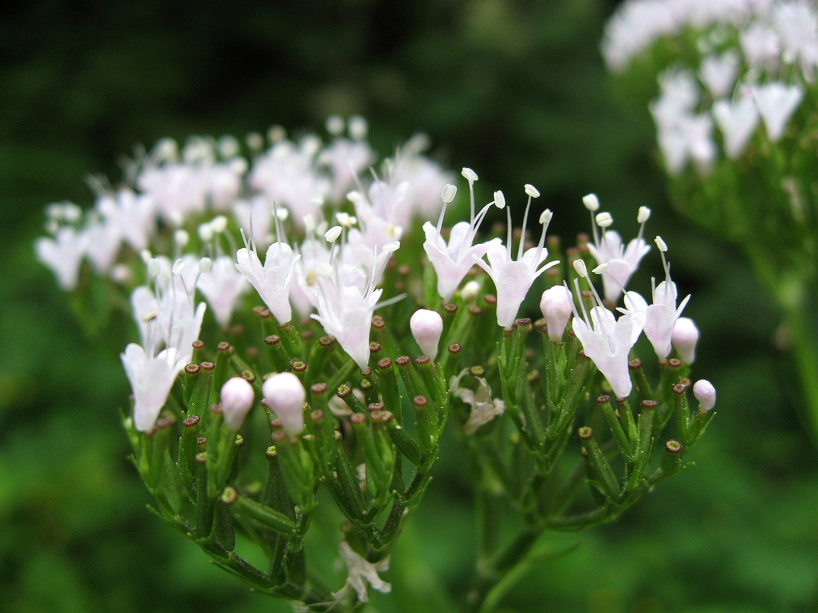 Pyrenäen-Baldrian (Valeriana pyrenaica)